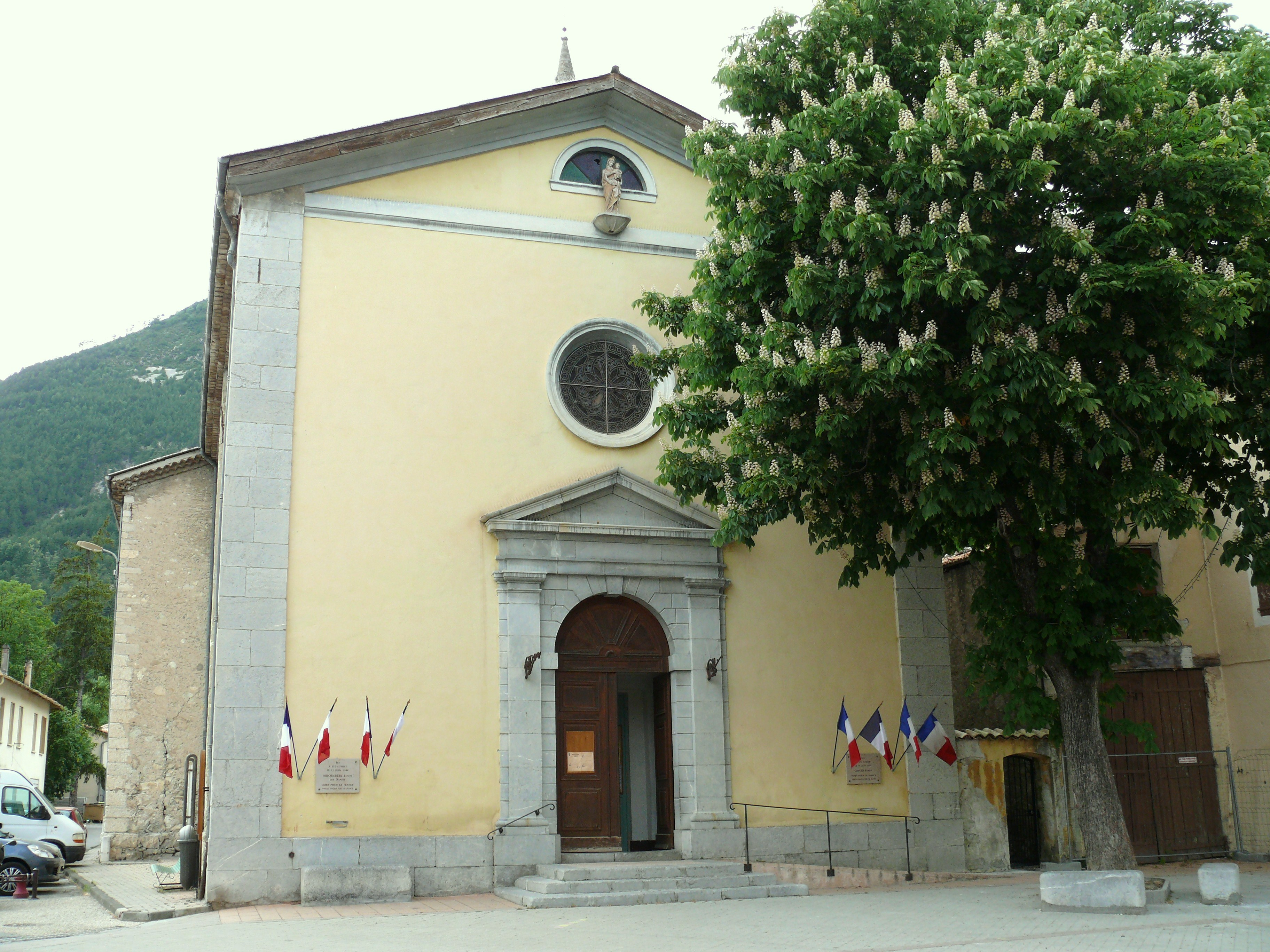 Saint-André-les-Alpes - Eglise